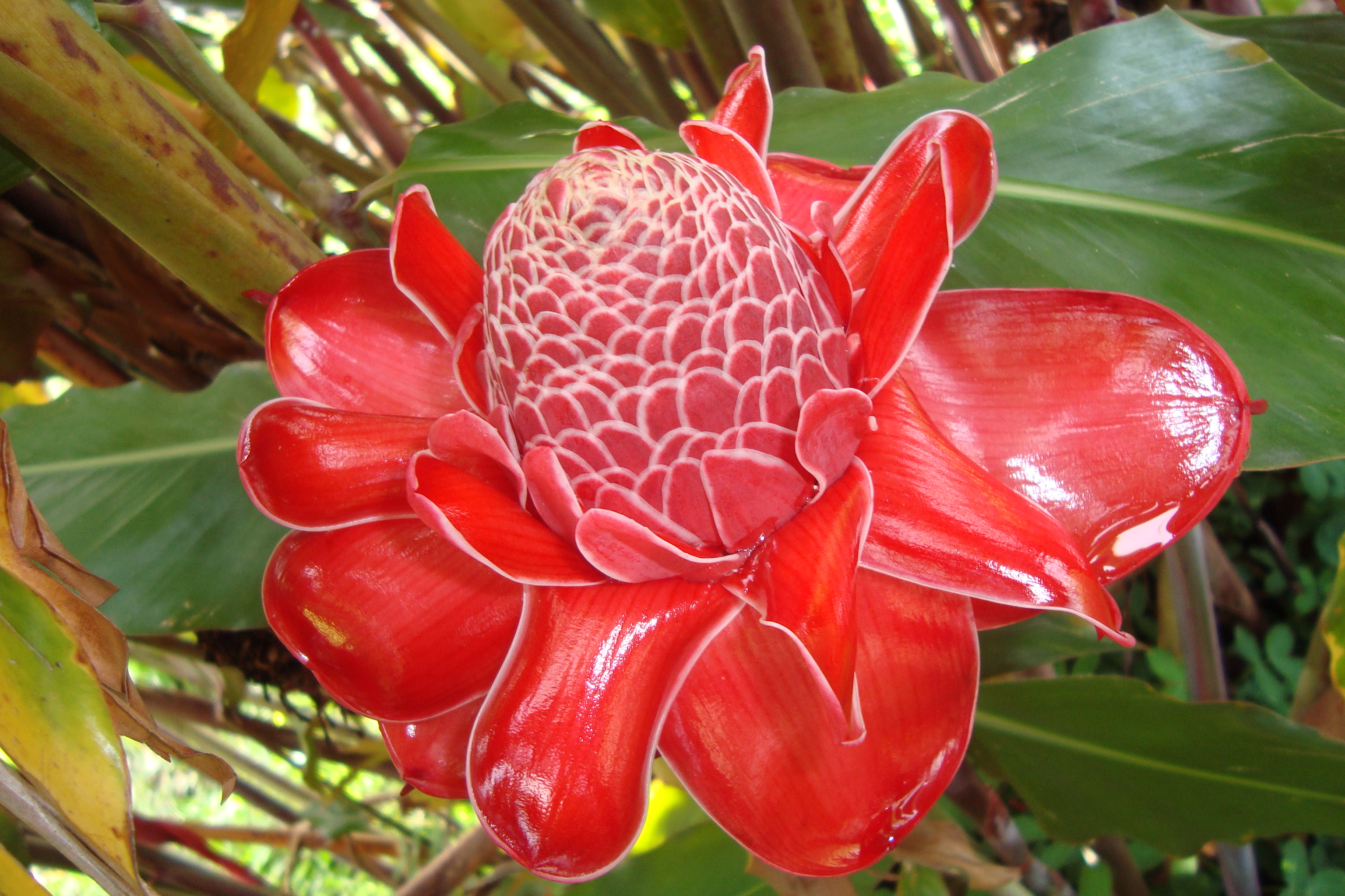 Flores exóticas cultivadas en Florencia (Caquetá).